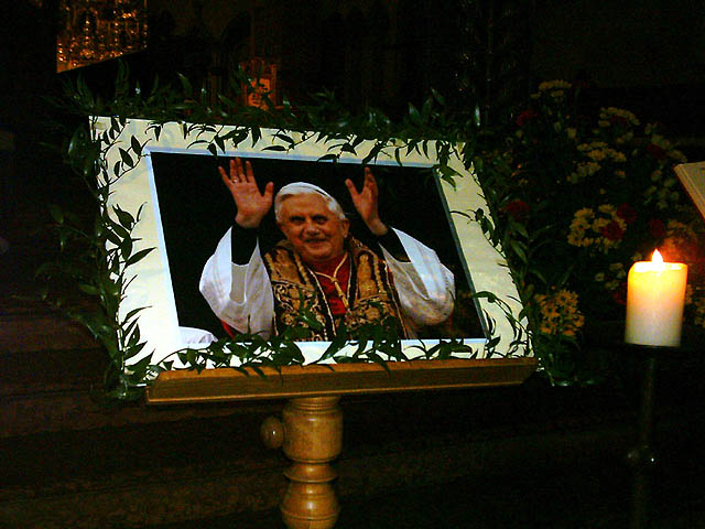 24. April 2005: Ehrenbild für Papst Benedikt XVI. vor dem Altar des Regensburger Doms anlässlich seiner Amtseinführung (Inauguration) Bildautor: wolpertinger